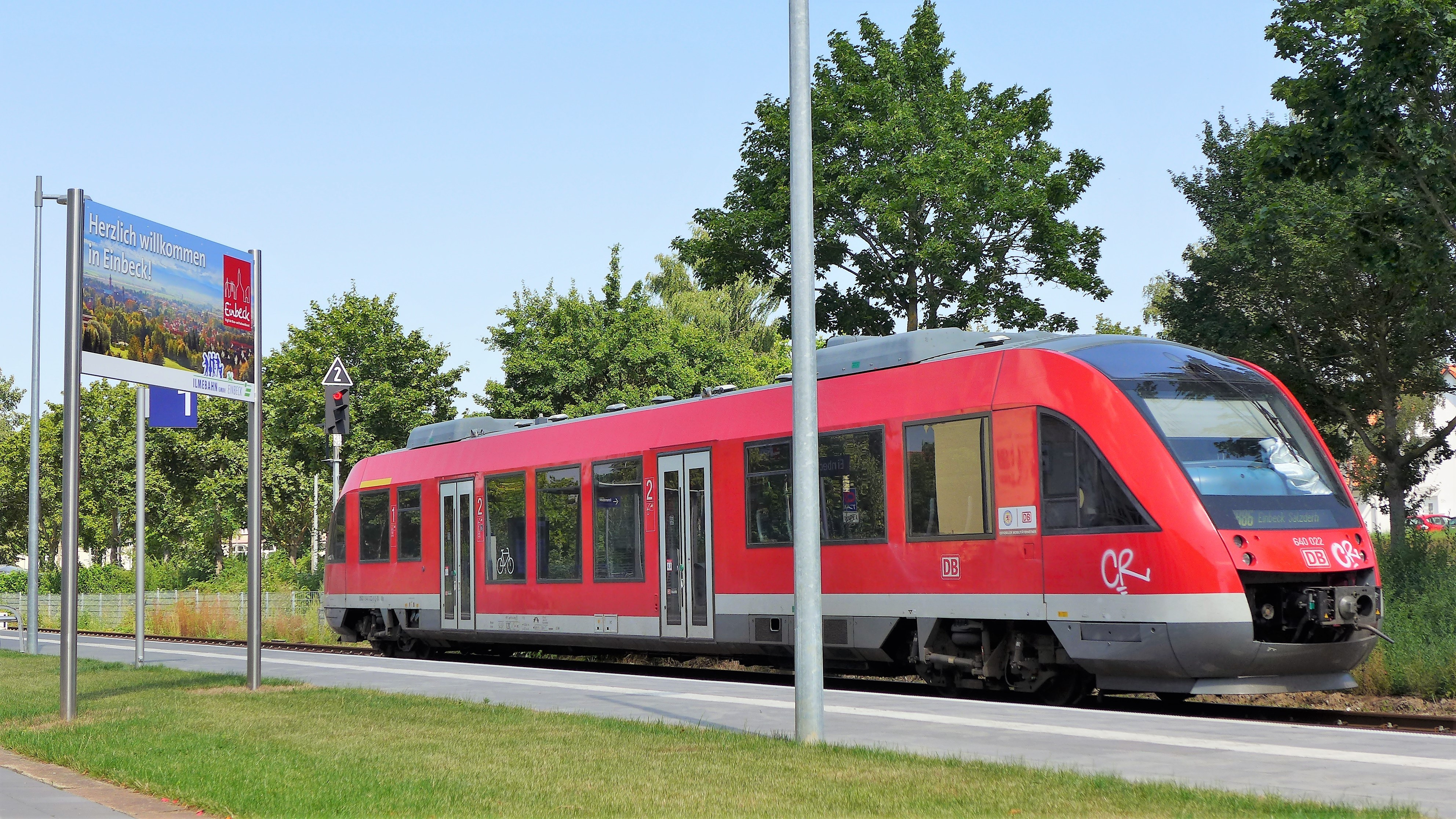 Schild: Herzlich willkommen in Einbeck